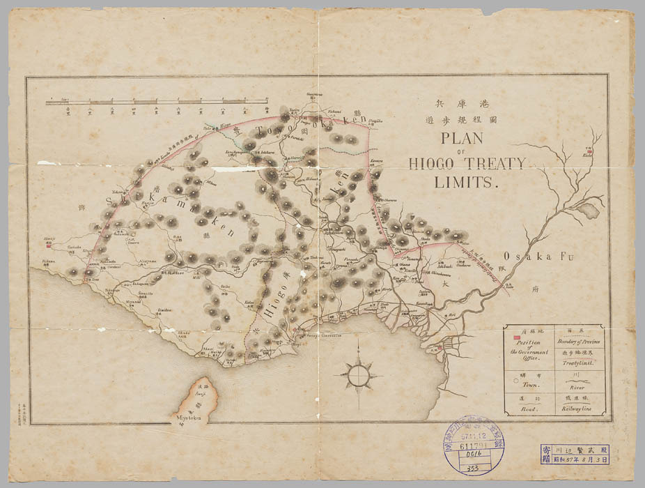 兵庫港遊歩規定図。居留外国人が自由に移動できる範囲を示している。 Licensing This work is in the public domain in its country of origin and other countries and areas where the copyright term is the author's life plus 50 years or less. This work is in the public domain in the United States because it was published (or registered with the U.S. Copyright Office) before January 1, 1923.